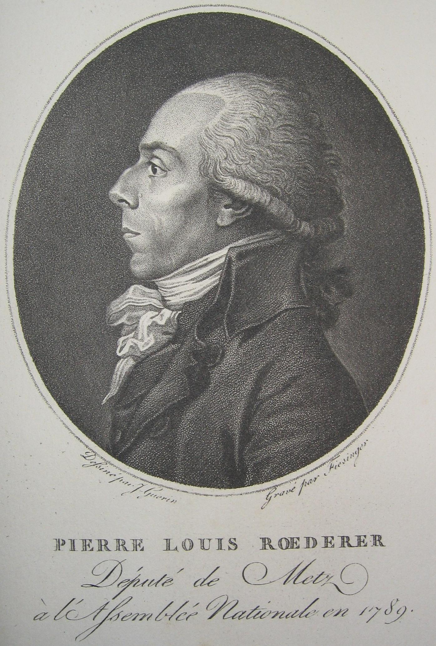 Portrait de Pierre-Louis comte Roederer (1754-1835)